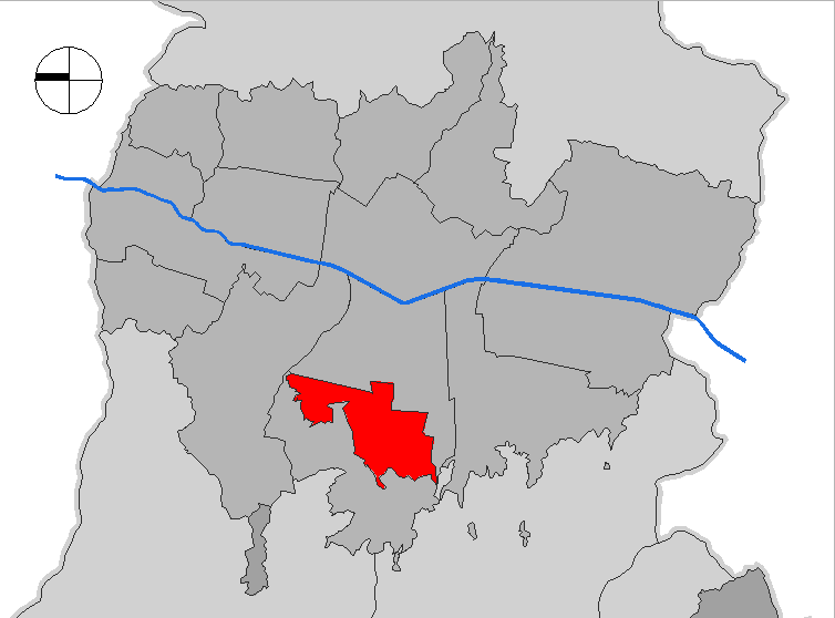 mapa de la comuna La América. Medellín, Colombia.